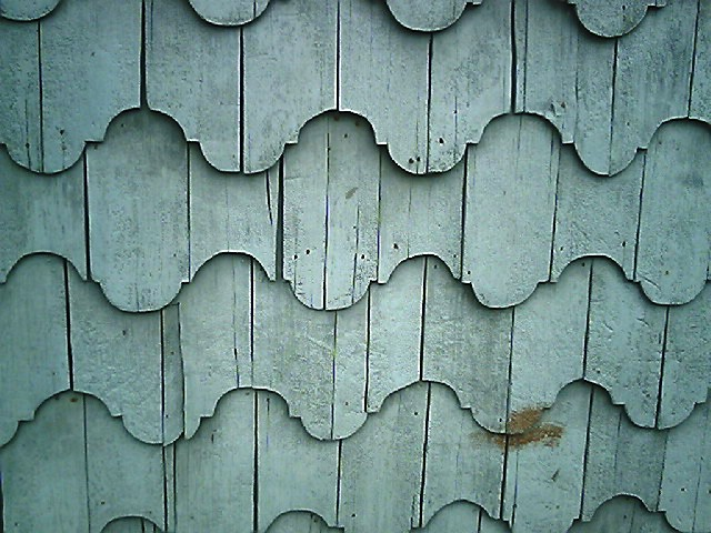 Tejuelas de alerce en el frente de una casa de Achao, capital de la comuna de Quinchao (Chile).